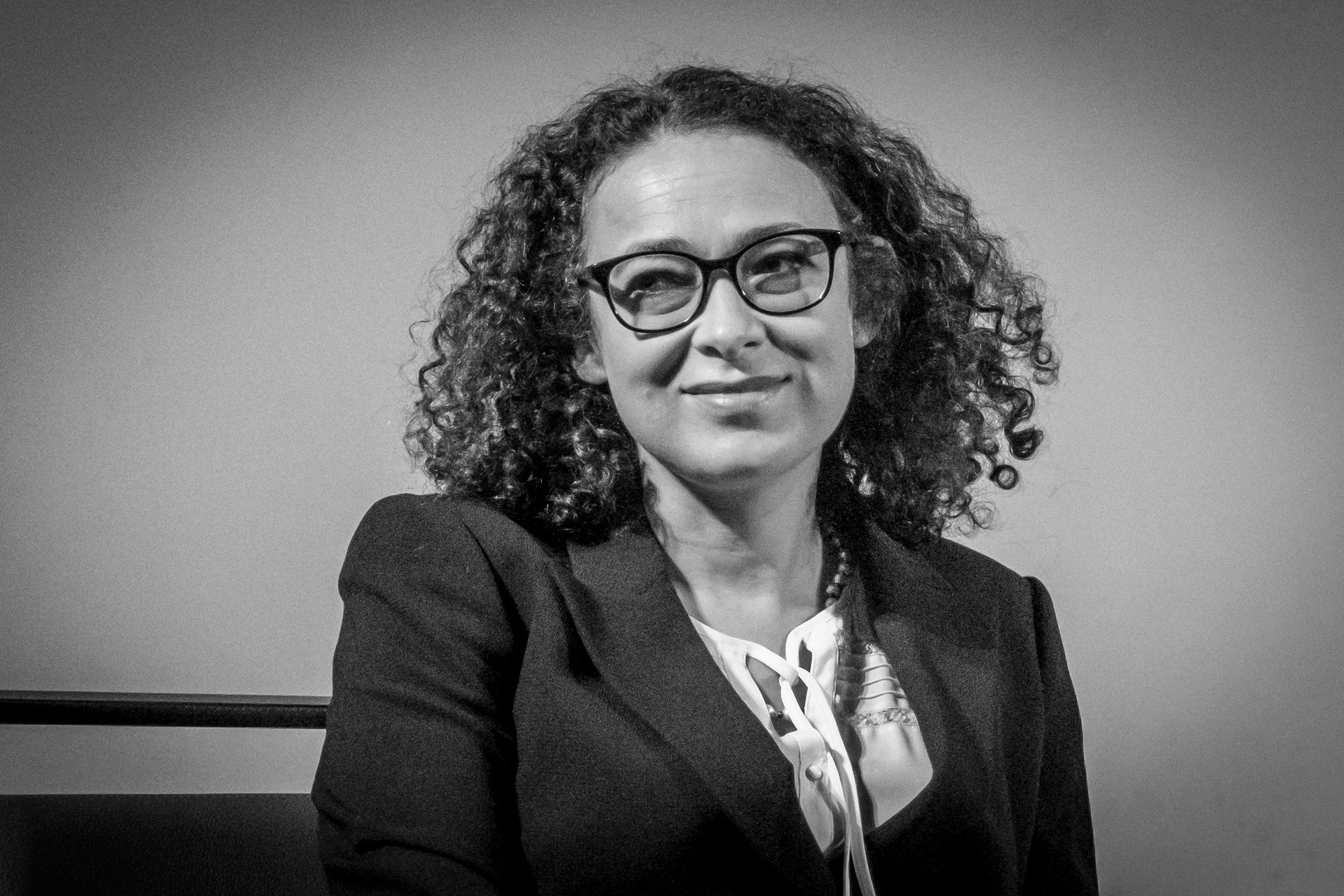 Delphine Horvilleur par Claude Truong-Ngoc